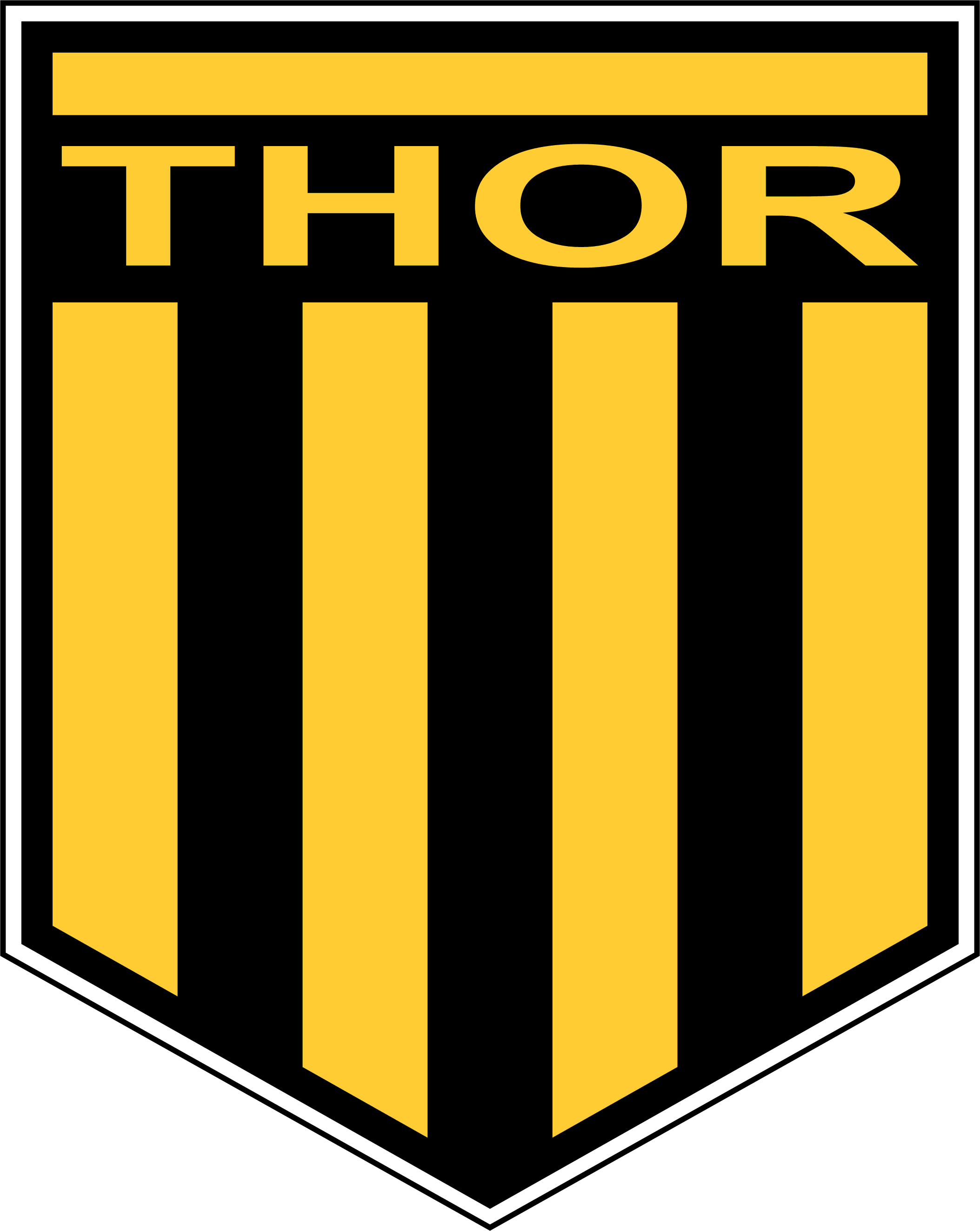 Logo de l'ancien club de football belge de Waterschei